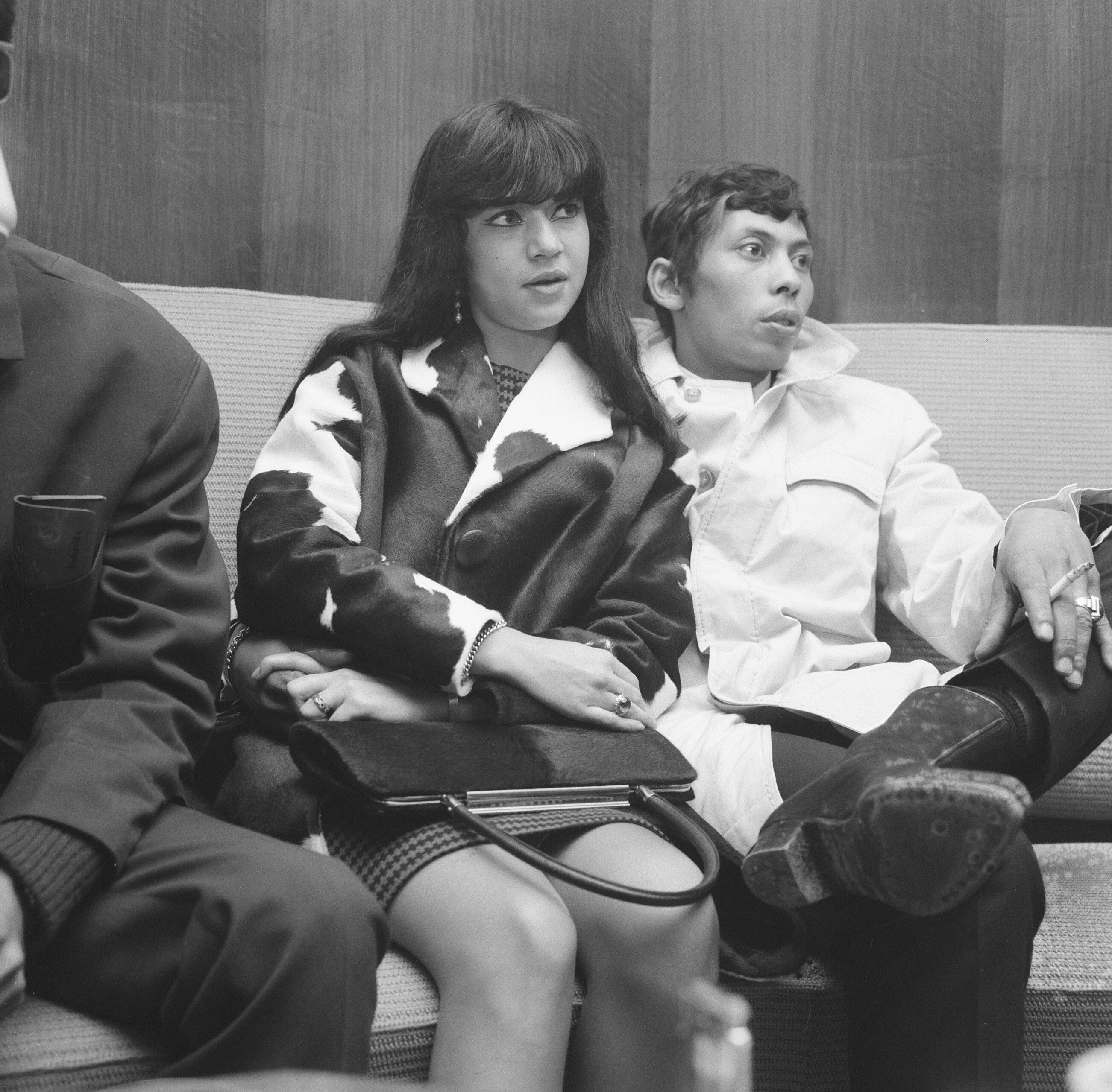 Collectie / Archief : Fotocollectie Anefo Reportage / Serie : [ onbekend ] Beschrijving : Aankomst Blue Diamonds op Schiphol, Ruud met echtgenote Datum : 3 februari 1966 Locatie : Noord-Holland, Schiphol Trefwoorden : ECHTGENOTES, aankomsten Persoonsnaam : Ruud Instellingsnaam : Blue Diamonds Fotograaf : Evers, Joost / Anefo Auteursrechthebbende : Nationaal Archief Materiaalsoort : Negatief (zwart/wit) Nummer archiefinventaris : bekijk toegang 2.24.01.03 Bestanddeelnummer : 918-7470 Reacties Geplaatst door Maaike op 10 september 2012 - 17:15. Ruud de Wolff met zijn echtgenote de Mexicaanse zangeres Leda Moreno. Persoonsnamen: Generaal de Bons-kazerne te Grave (Noord-Brabant) Persoonsnamen: Ruud de Wolff; Leda Moreno